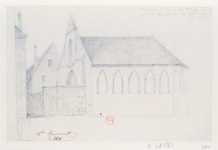 Ancienne église des Célestins de Paris, au coin de la rue du Petit-Musc (IVe arrondissement), dessin à la mine de plomb de Charles Ransonnette de 1831